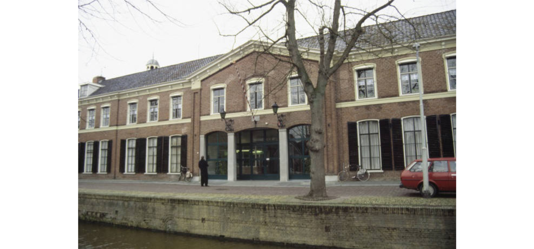 Franeker ; Academiestraat 13 - 22 ; Openbaar gebouw ; volledig (exterieur) ; Voormalig klooster, nu P.I. Groot Lankum ; voorheen nummer 10.